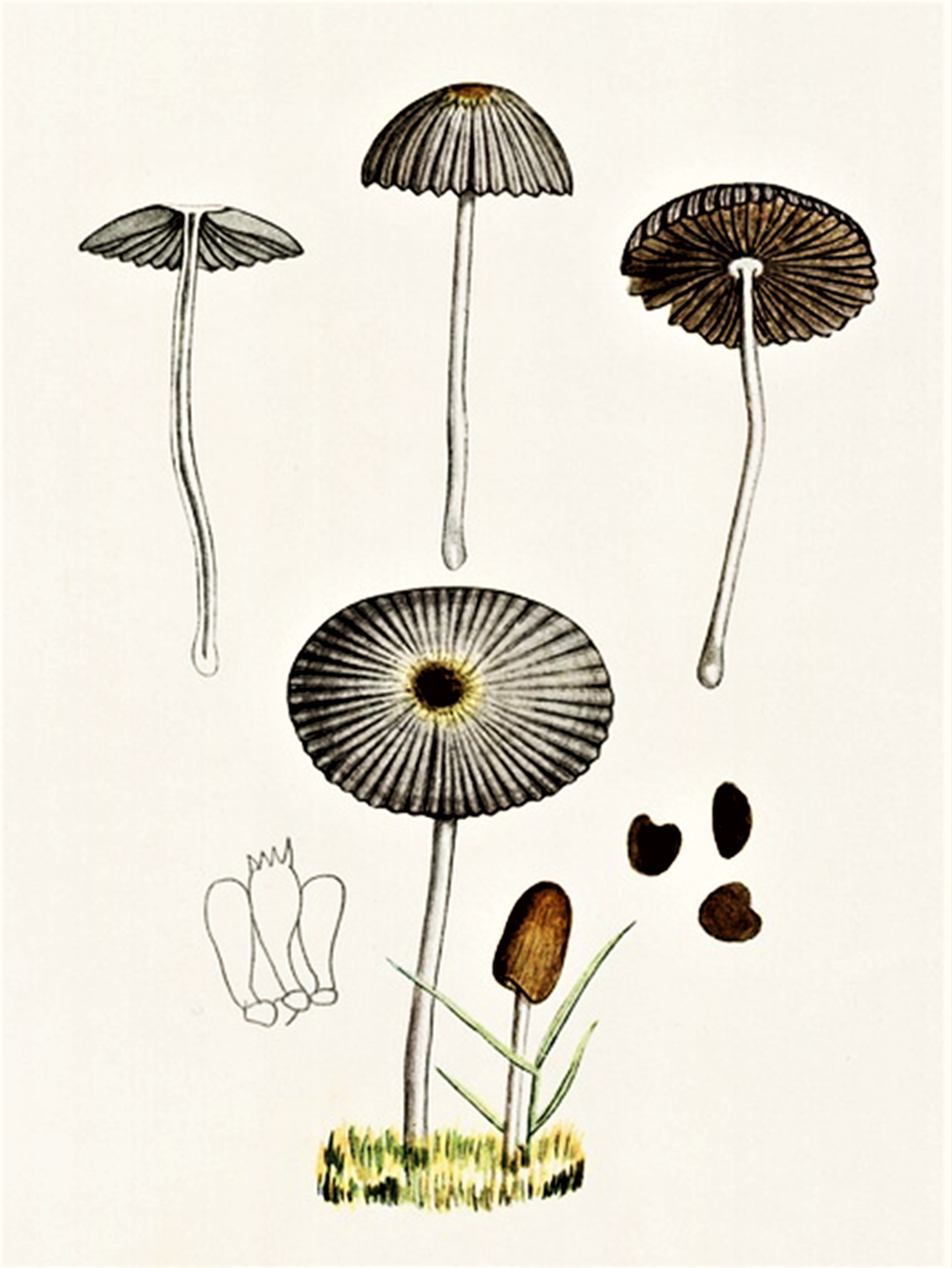 Giacomo Bresadola: Coprinus plicatilis (Curtis, 1787) Fr., 1838) Fr. (1838), heute Parasola plicatilis (Curtis) Redhead, Vilgalys & Hopple (2001)